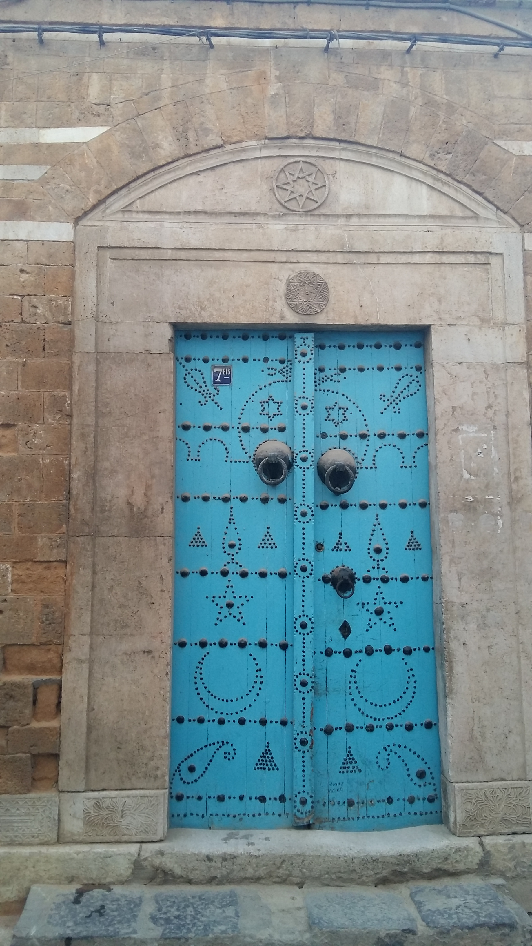 Zaouïa Sidi-Ali-Azzouz